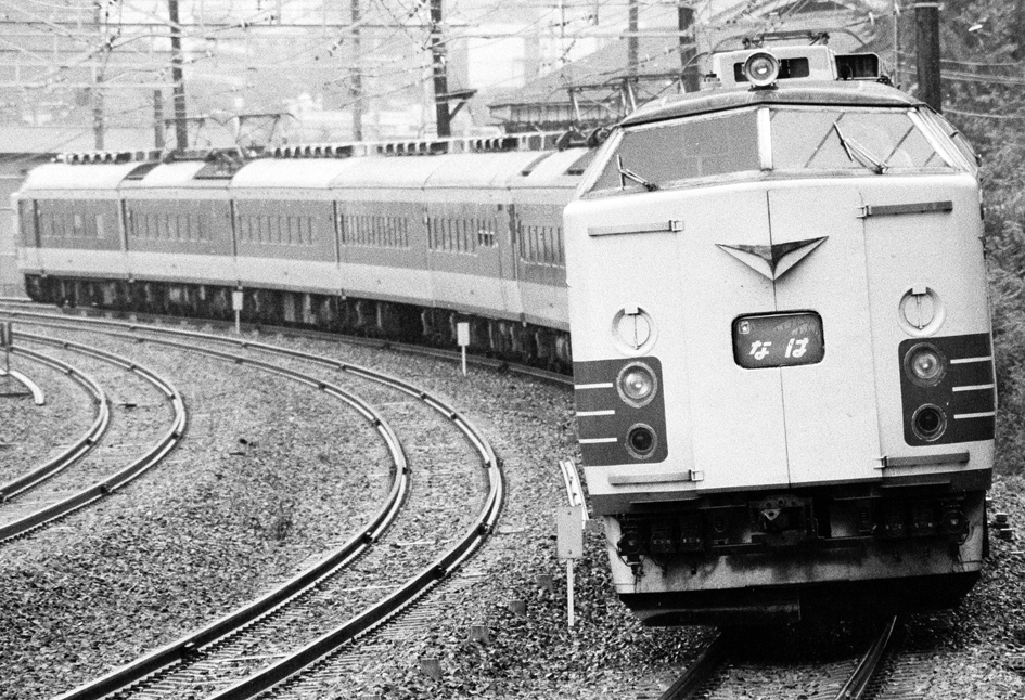 国鉄581・583系特急形電車 特急なは（画像は回送列車）